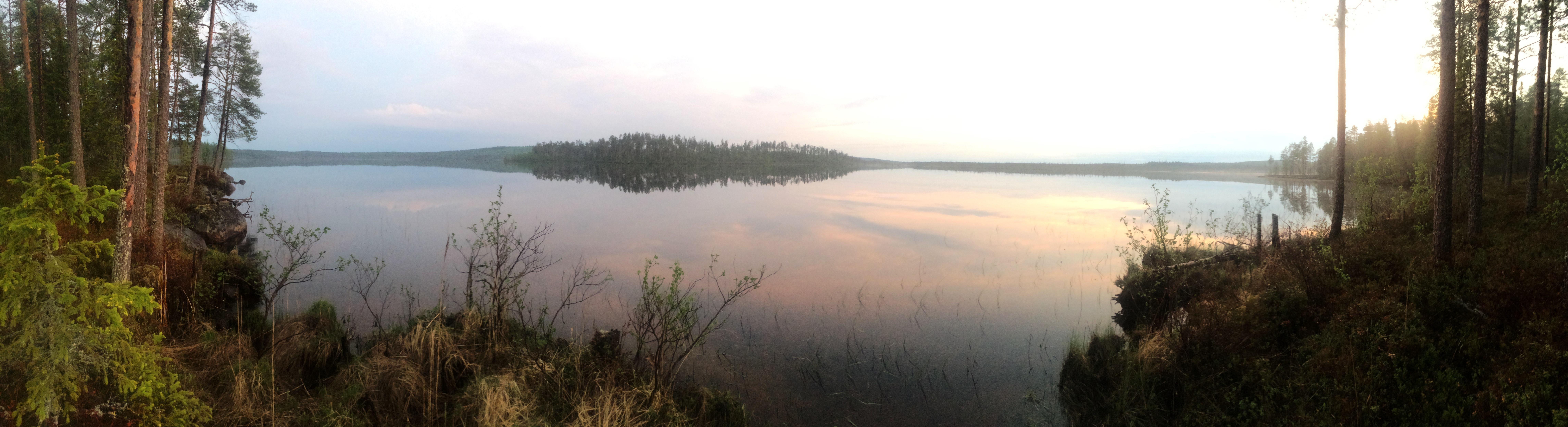 Мечелоут (озеро)